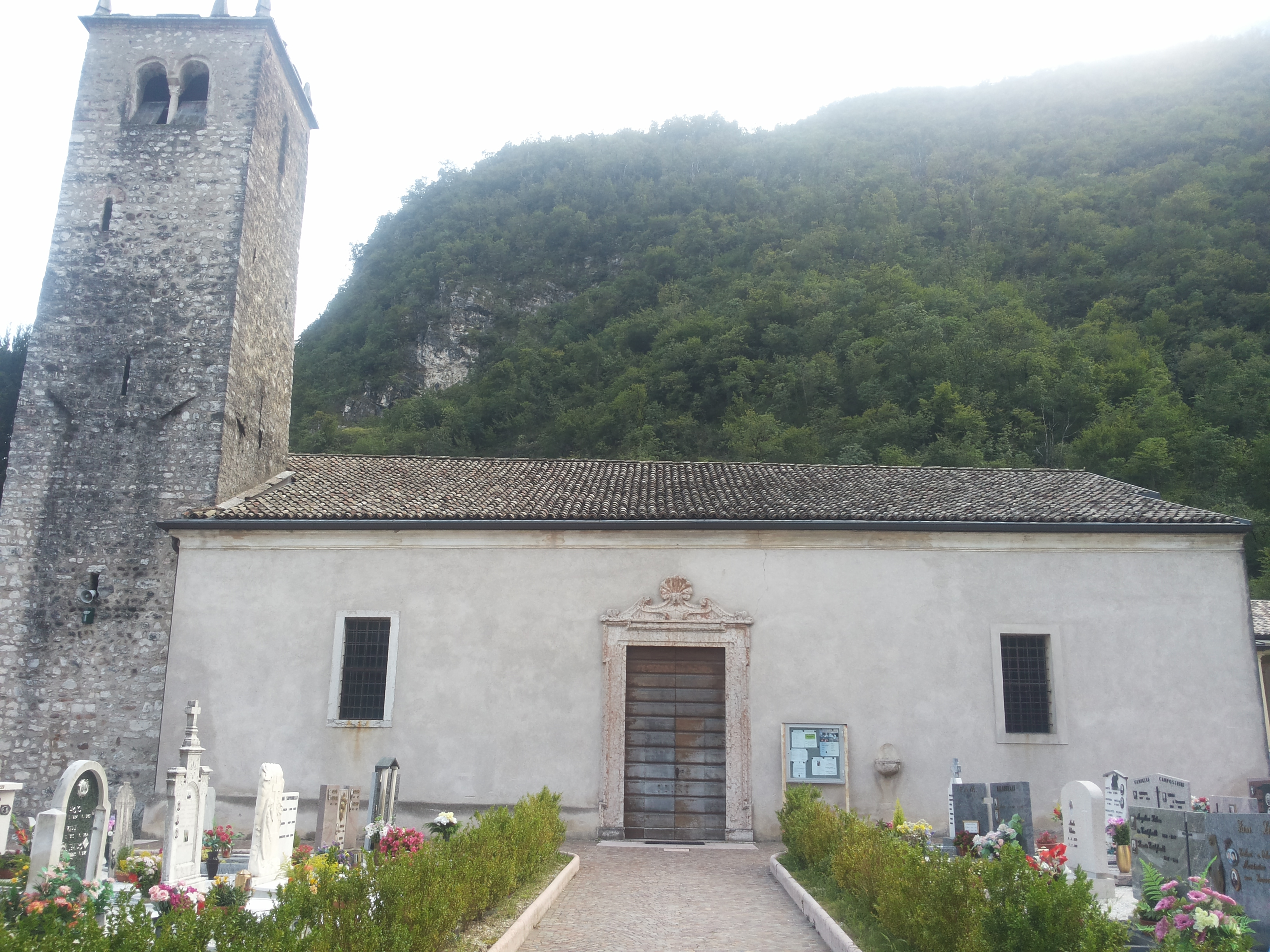 Esterno della pieve di Avio (Trento)